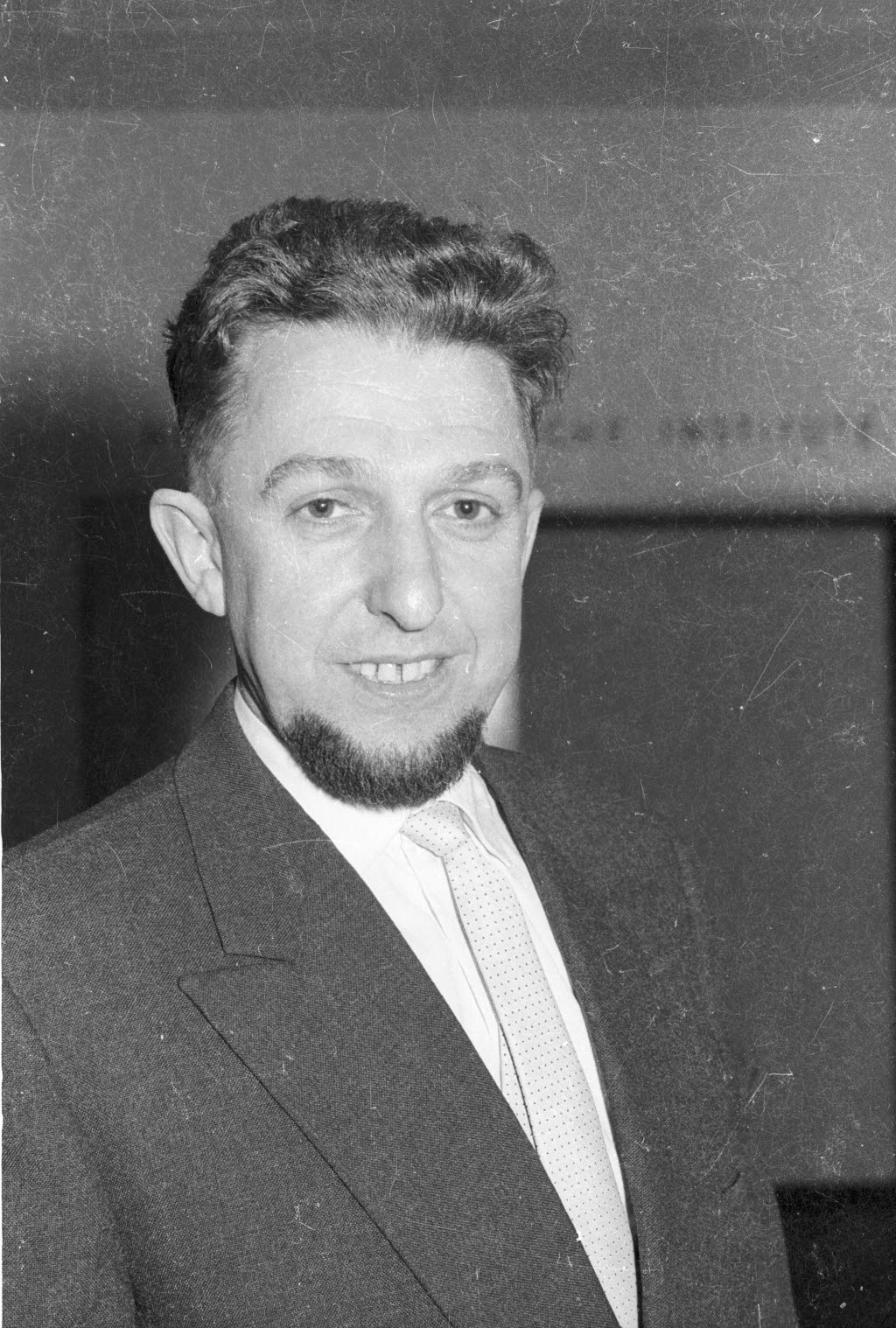 Professor für Meereskunde (Fischereibiologie) an der Christian-Albrechts-Universität (CAU).